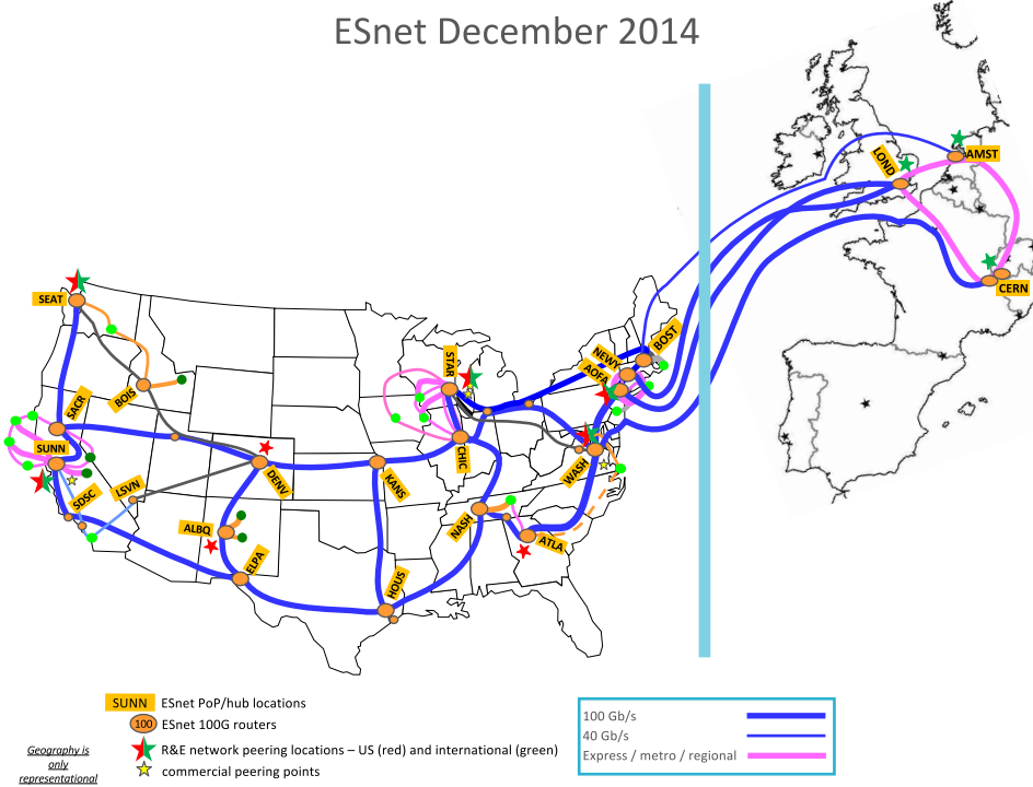 ESnet connection to Europe